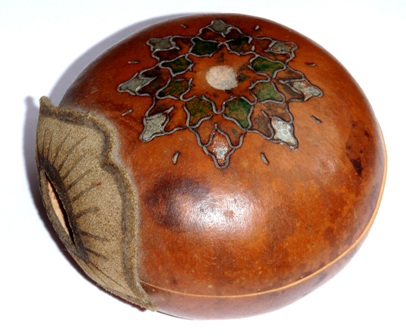 Foto de un matofono